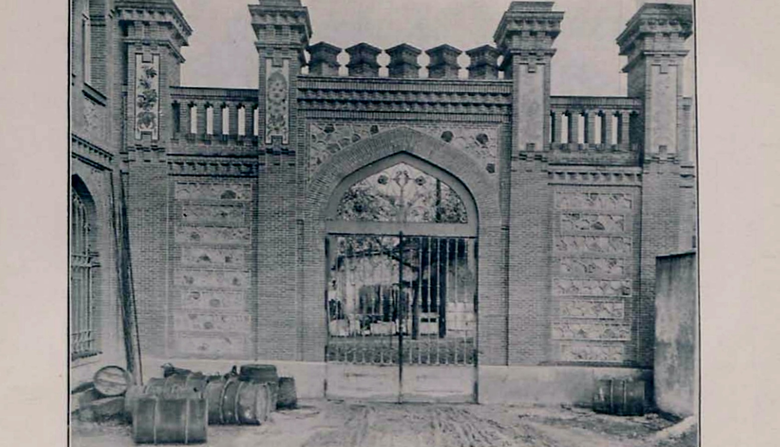 Entrada del patio de la antigua fábrica de la Perfumería Gal. Esta factoría estuvo situada en la zona de Moncloa, en Madrid (España). Fue construida entre 1913 y 1915 por el arquitecto riojano Amós Salvador y Carreras, en sustitución de un establecimiento anterior, situado en la calle de Ferraz, que, a su vez, reemplazó a un primitivo comercio de la calle del Arenal. Fue ampliada entre 1918 y 1919. Desapareció en los años 1960. Sobre su solar se levanta hoy día el complejo Galaxia.